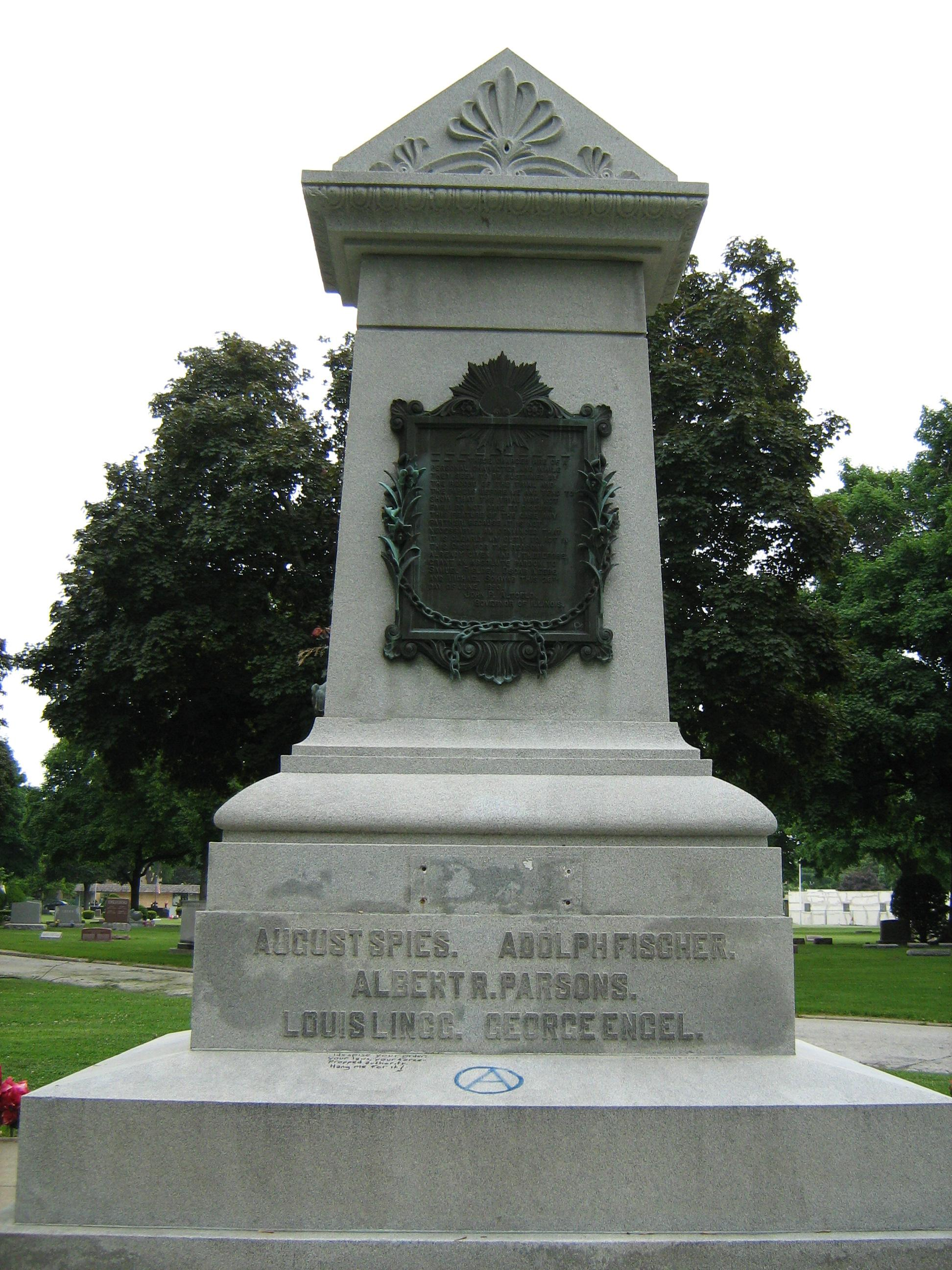 Haymarket Martyr's Memorial